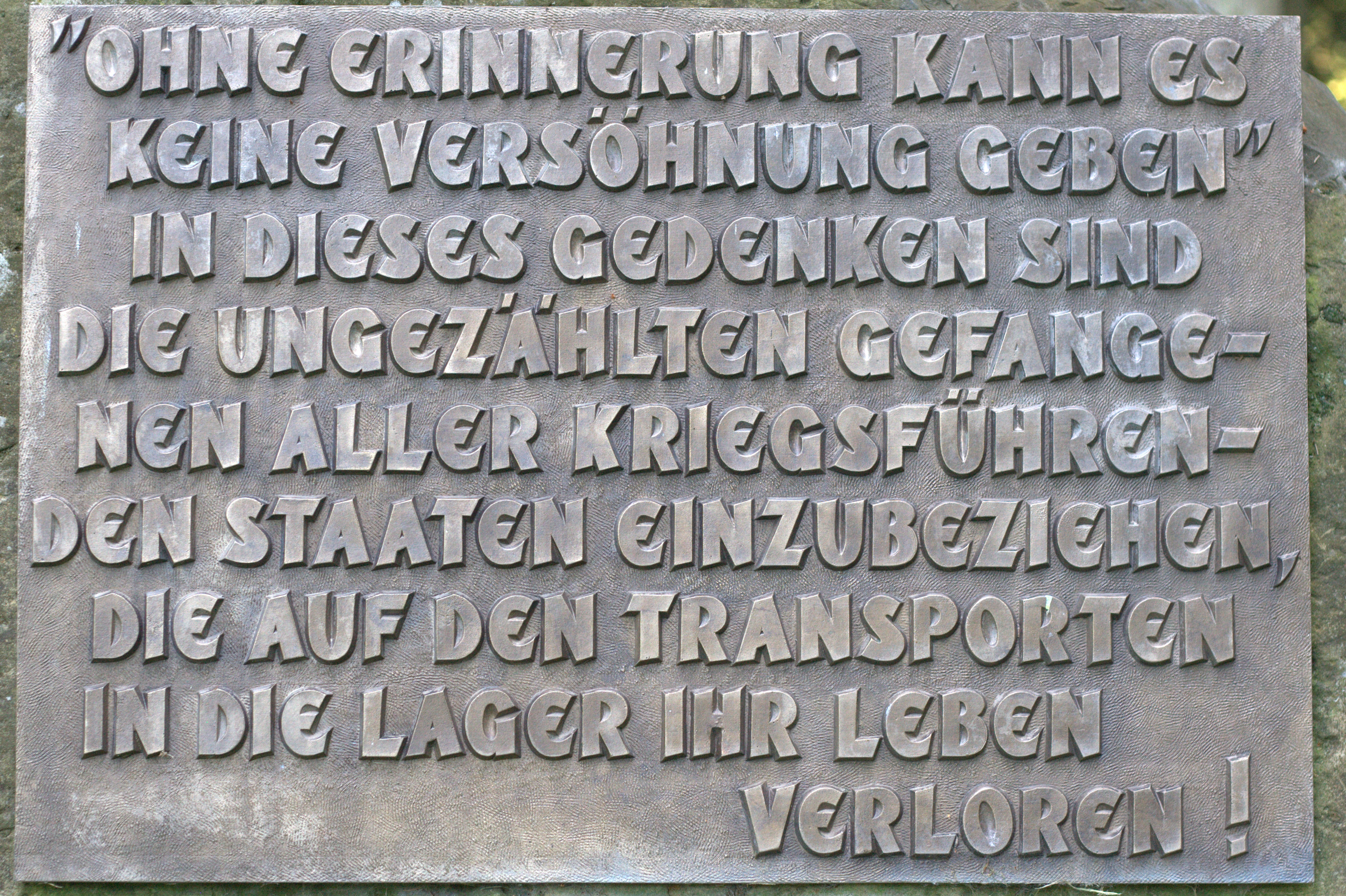 Gedenktafeln für die Ehrung der verstorbenen des Kriegsgefangenenlagers Stalag IX A Ziegenhain